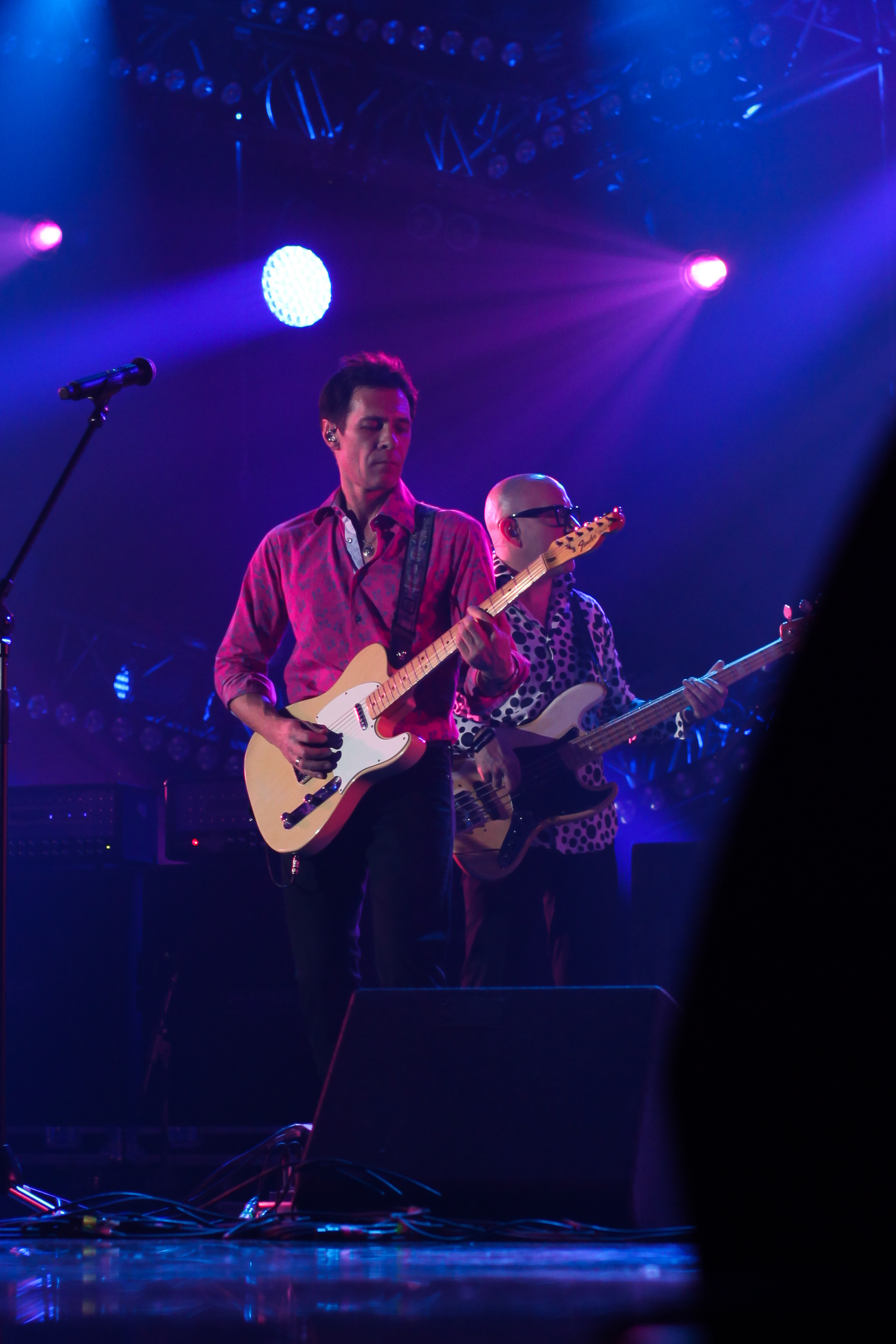 20 лет Рунету